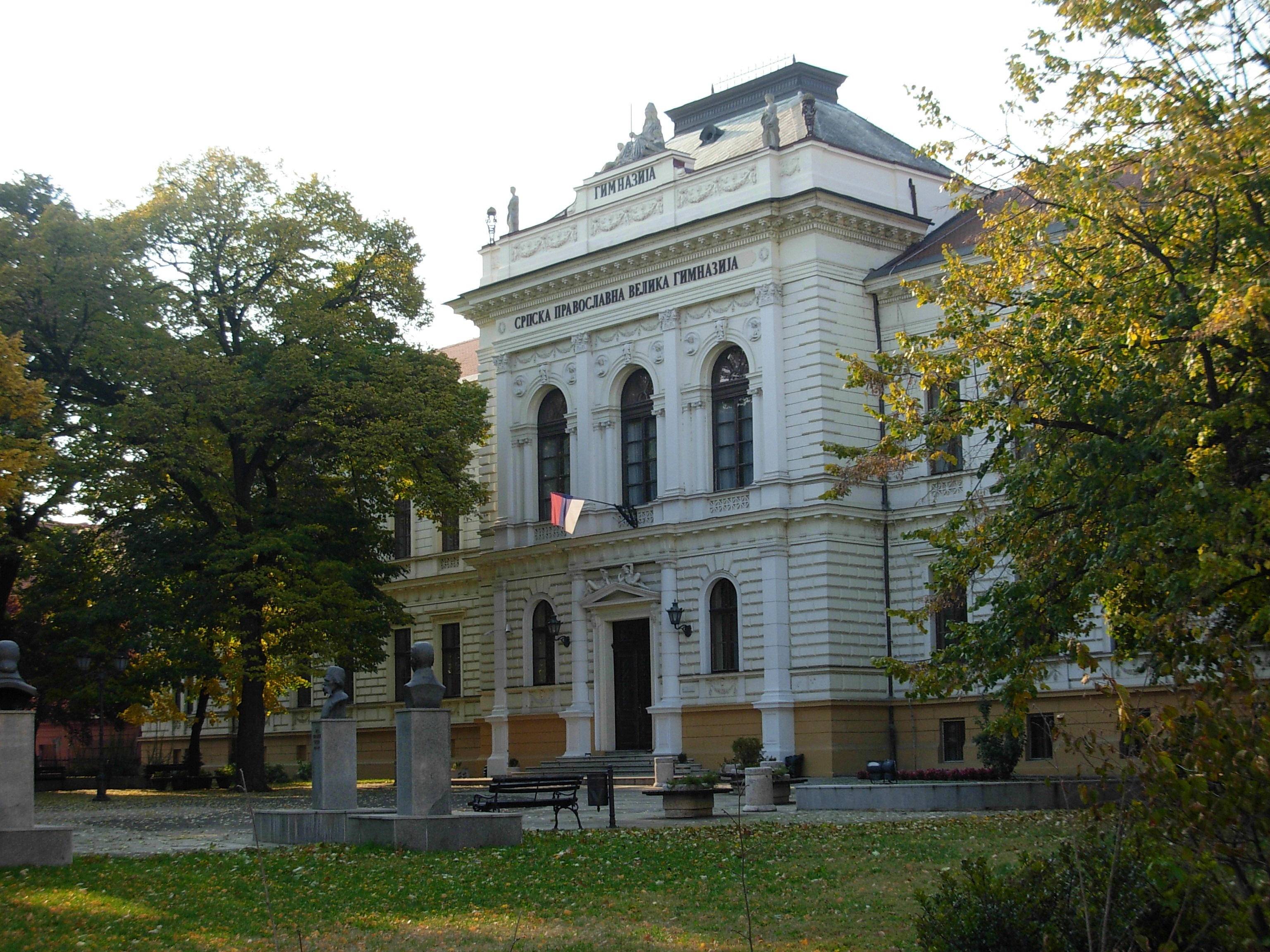 Gimnazija Jovan Jovanović Zmaj u Novom Sadu.